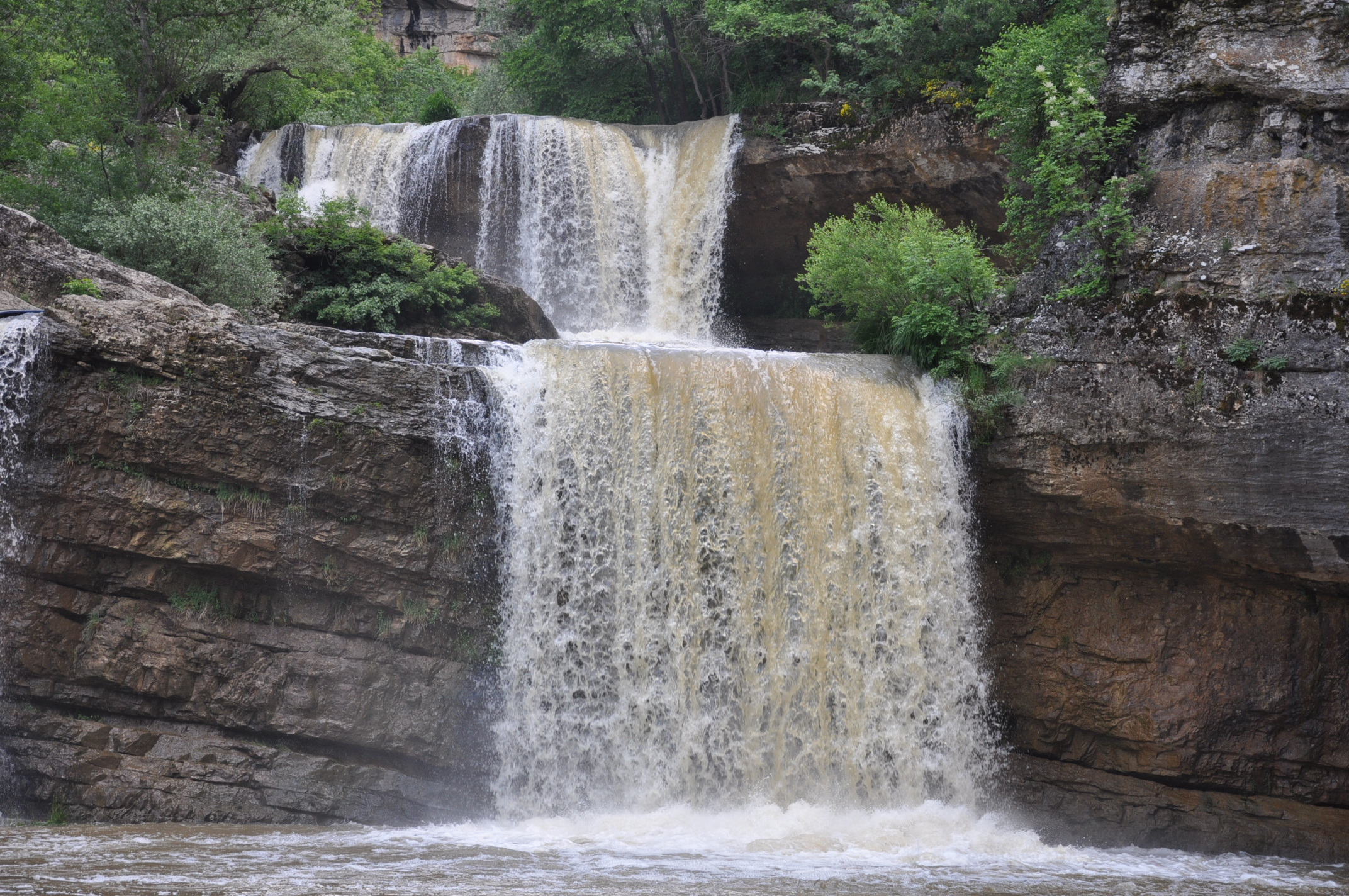 Pamje e Ujevarave te Mirushes